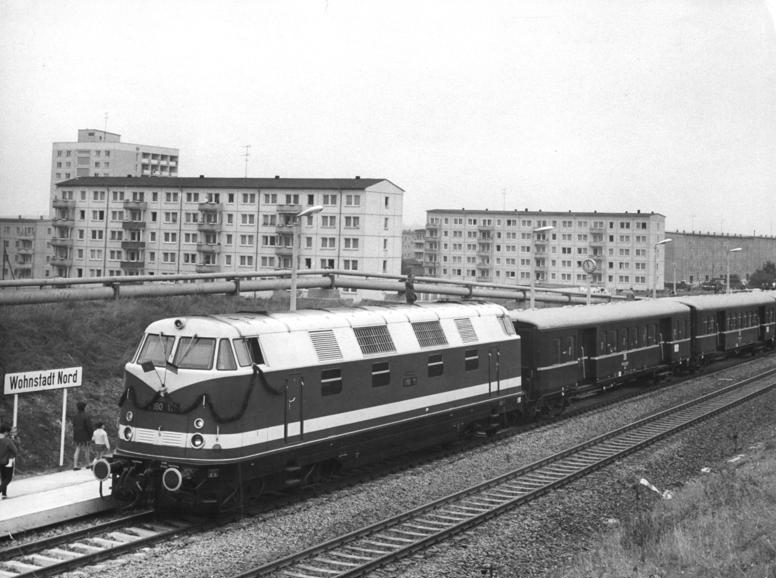 Halle, Halle-Nord, Bahnhof, Zug Zentralbild Schaar 27.9.69-B-Halle-Eine Stadtschnellbahn nahm Betrieb auf - Ein Zug der neuen Stadtschnellbahn von Halle ist in die Station Wohnstadt-Nord eingefahren. Nach nur sechsmonatiger Bauzeit hatte die S-Bahn am Morgen des 27.9.69 ihren Betrieb aufgenommen. Sie verkehrt 34 mal täglich zwischen dem Hauptbahnhof und dem Norden der Stadt. Dadurch verkürzt sich die Fahrzeit für Tausende Werktätige um mehr als die Hälfte. Information added by Wikimedia users.